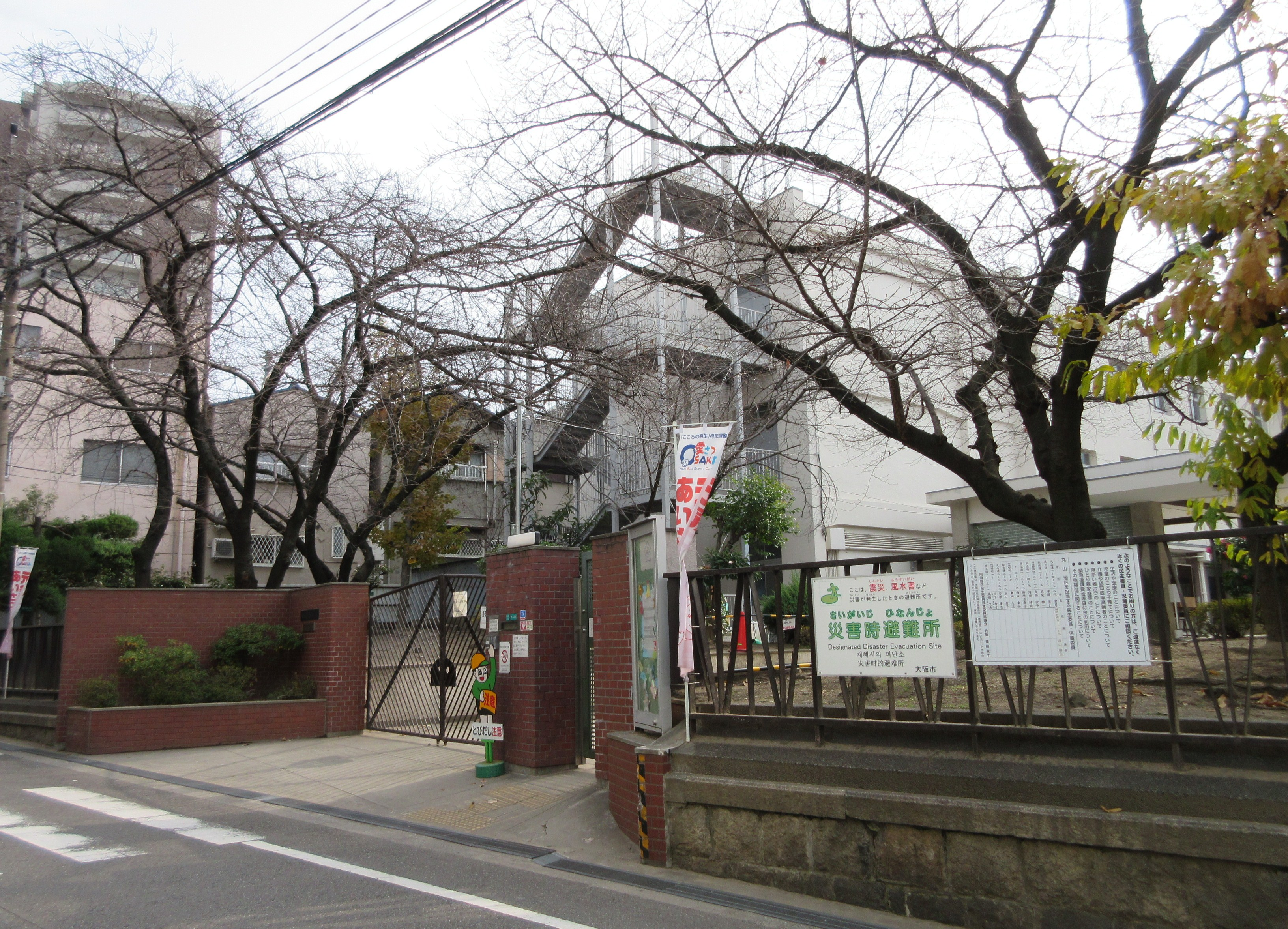 大阪市立丸山小学校